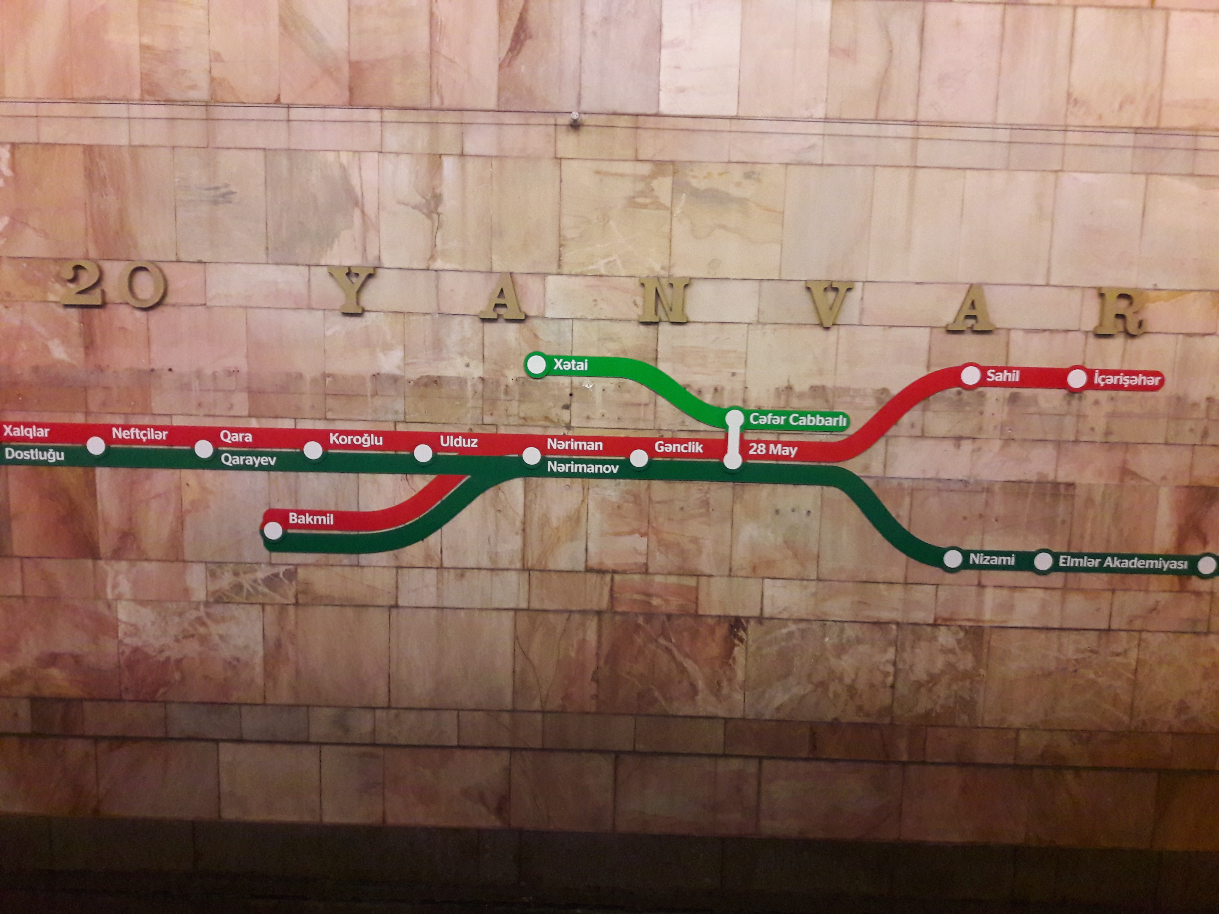 20 Yanvar metrosu. 2017.11.20